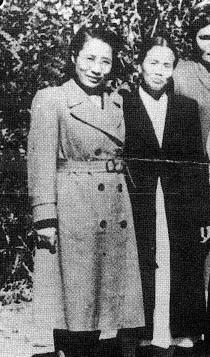 1948년 11월 평양 주둔 소련군 철수 직전 소련군 고위장성 부인들의 석별 기념촬영 중인 허정숙 문화선전상과 박정애 북로당 중앙상무위원 겸 부녀부장